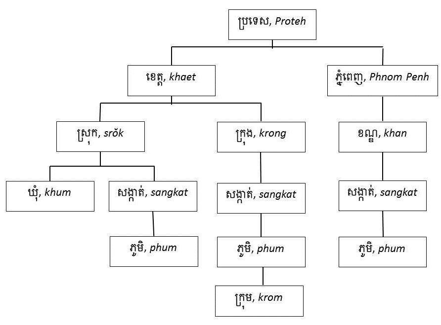 Hierarchie des différentes entitées administratives cambodgienne